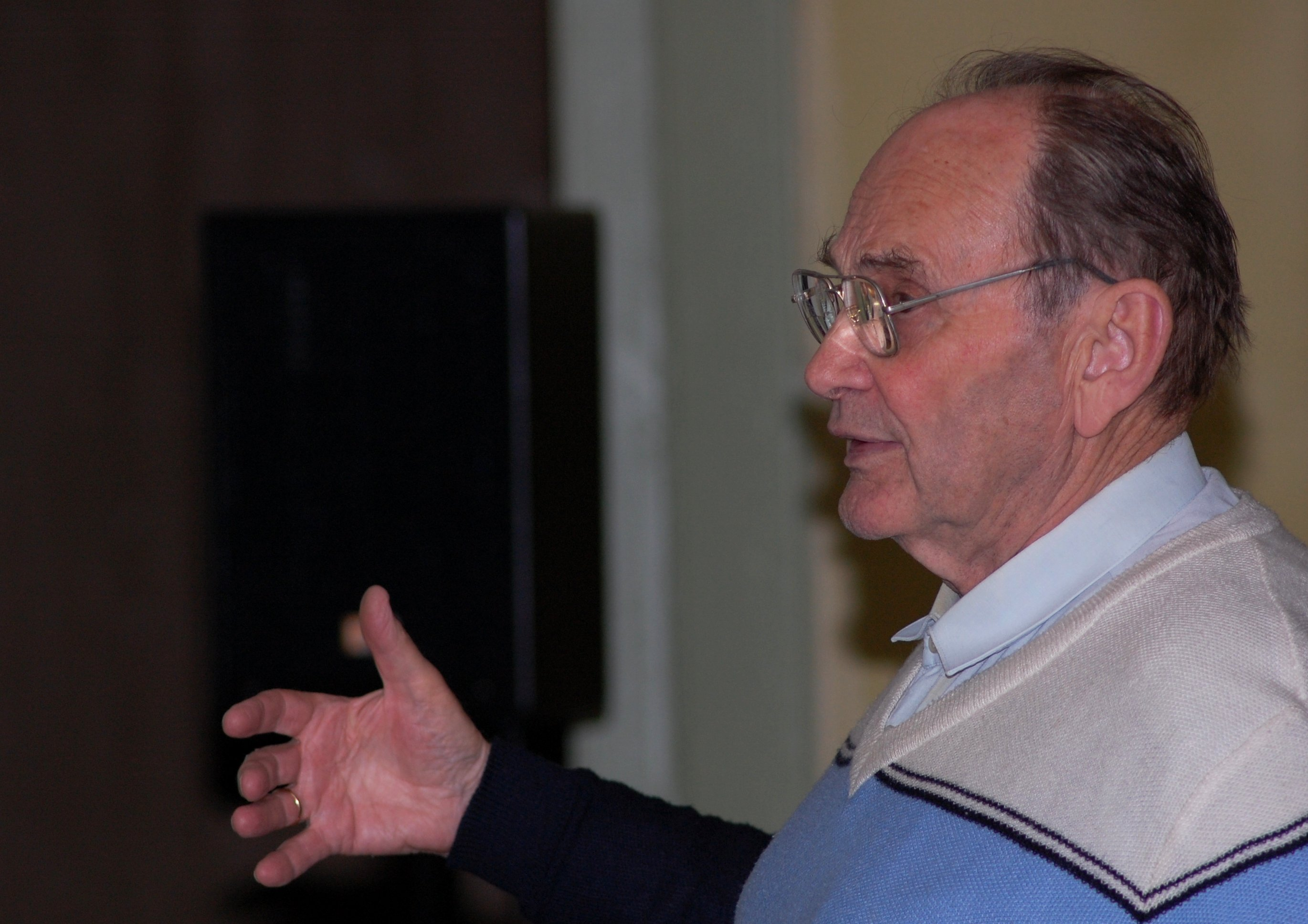 Jaan Einasto Astronoomiahuviliste kokkutulekul Sänna kultuurimõisas